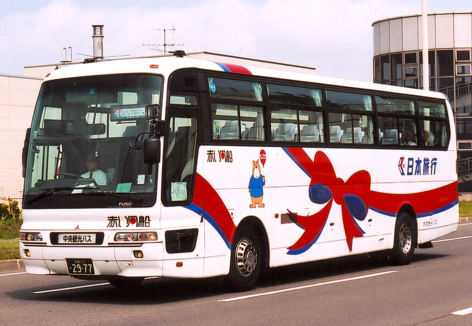 中央観光バス エアロクィーンI 日本旅行色